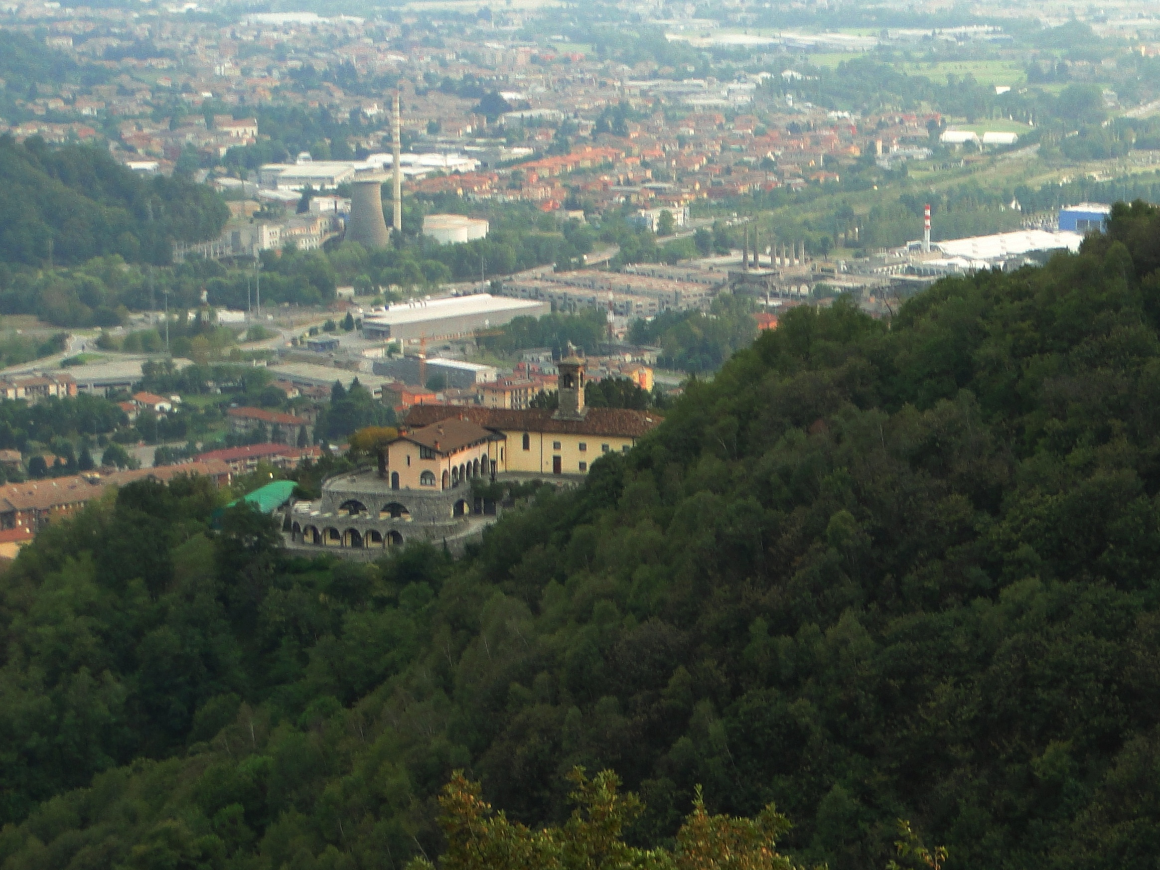 Santuario Zuccarello, Nembro, Bergamo, Italy